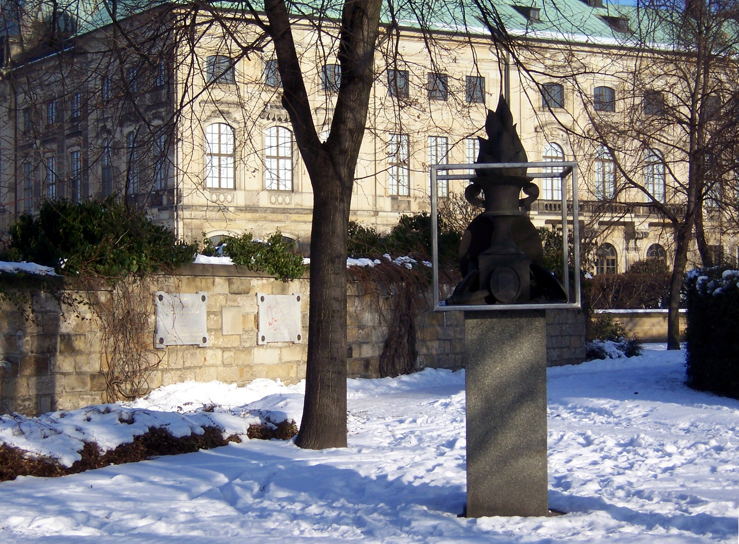 Wolf-Eike Kuntsche - Familie Körner und ihr Kreis in Dresden (1985-1987) am ungefähren Standort des Körnermuseums/Wohnhauses der Familie Körner in Dresden.